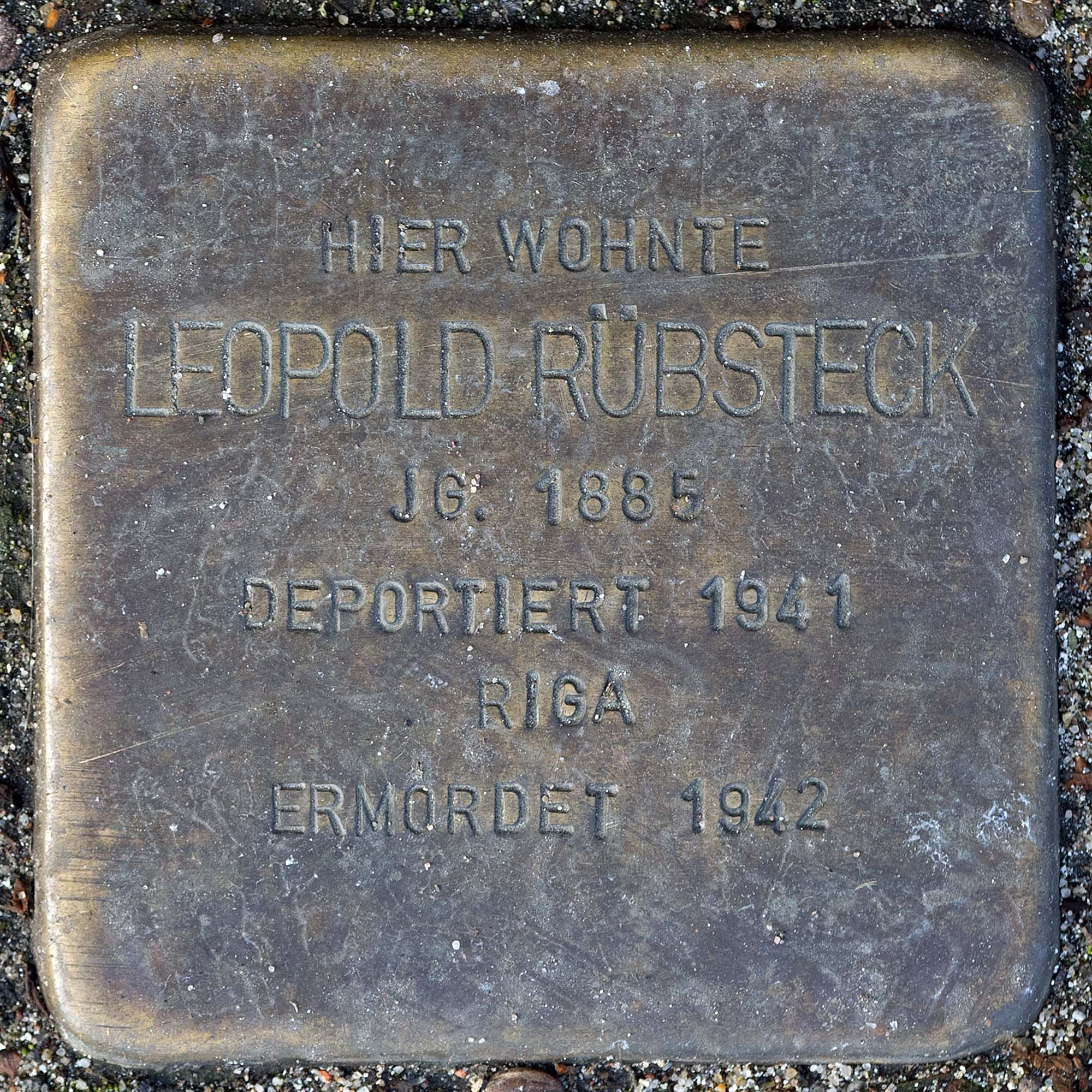 Stolperstein für Ruebsteck Leopold